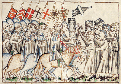 Římská jízda Jindřicha VII. u Brescie